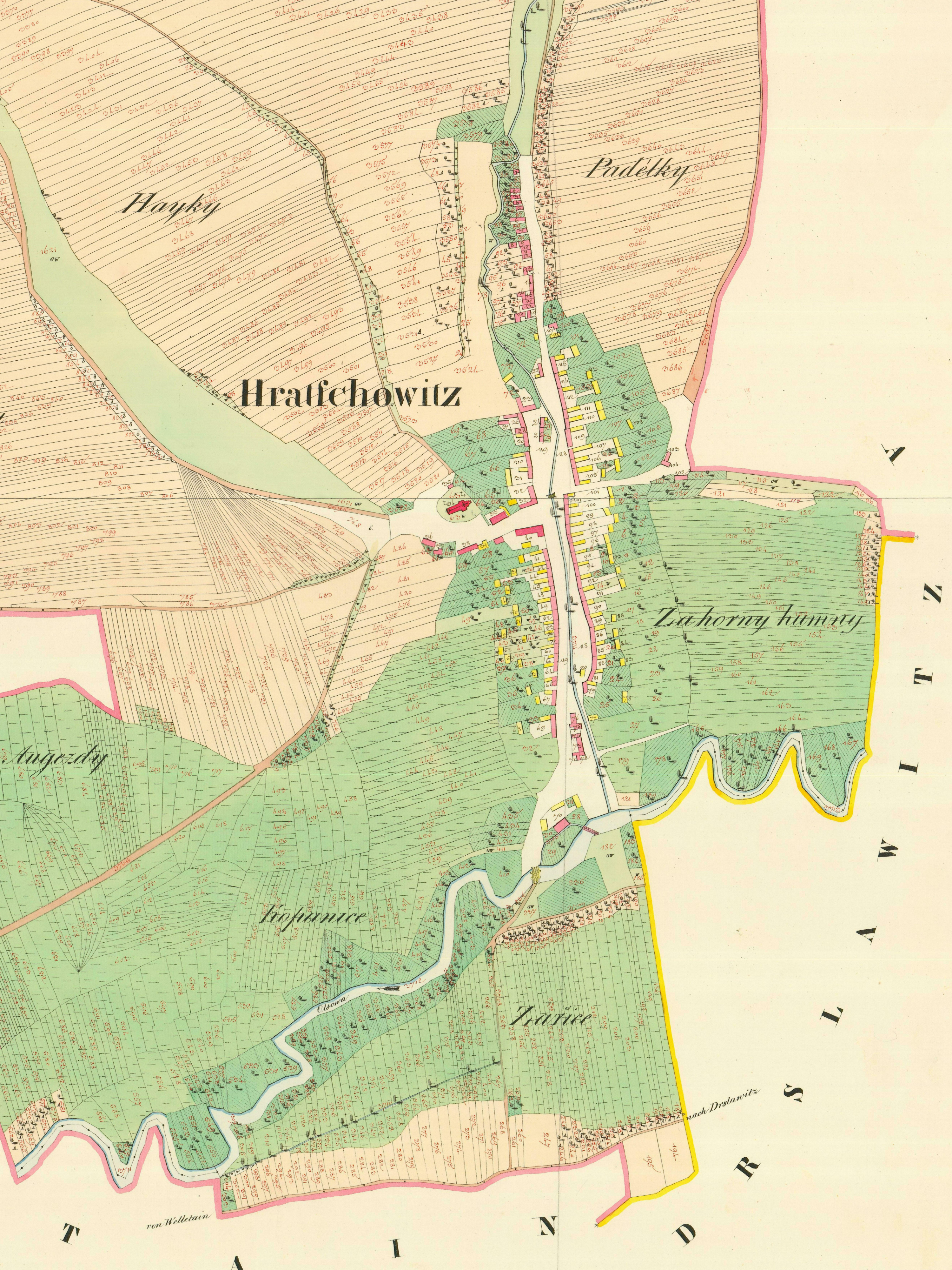 Hradčovice na císařských otiscích map Stabilního katastru z roku 1827 (Výřez z mapových listů kód 0885-1-003 a 0885-1-004)